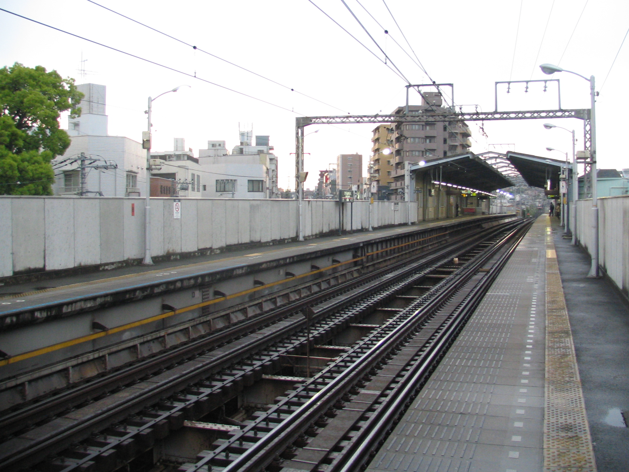 東白楽駅 Higashi-Hakuraku sta.